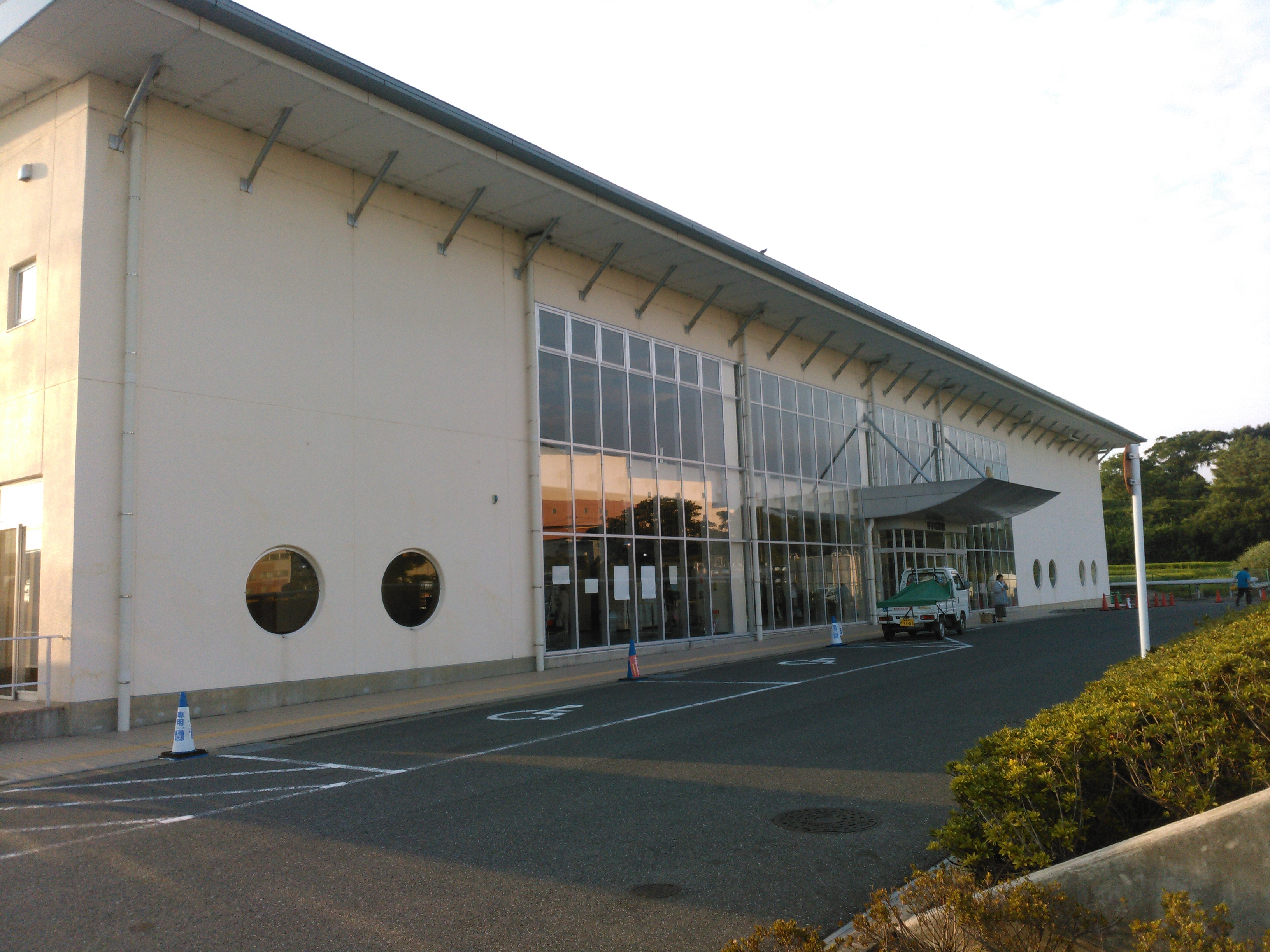 りすぱ豊橋 - 建物外観